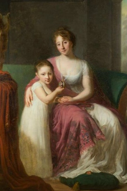 Портрет княгини Н. Ф. Енгалычевой с дочерью. Неизвестный художник. Круг Э. Л. Виже Лебрен (1755-1842) (?). 1800-е гг. Княгиня Надежда Фёдоровна Енгалычева, ур. Протасьева (1776/1780—1840), дочь Федора Михайловича Протасьева; жена писателя князя Парфения Николаевича Енгалычева (1769—1829), изображена с дочерью Анной (ум. 1873) или Александрой (1799—1871).